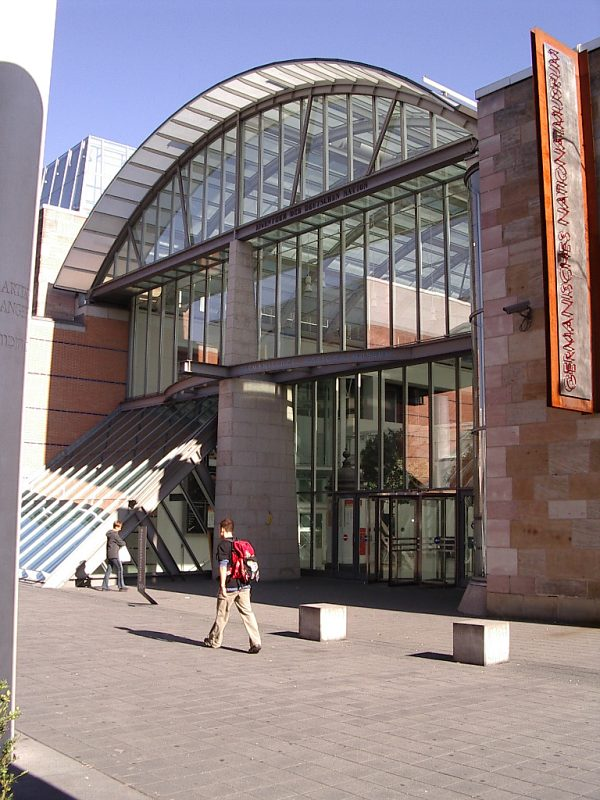 Beschreibung Nürnberg, Germanisches Nationalmuseum, Haupteingang v. SW (2003-10-17) Quelle Fotographie 2003-10-17 Fotograph --Keichwa Copyright Status GNU Freie Dokumentationslizenz Vgl. Bild:nuernberg gnm haupteingang menschenrechte v nnw.jpg